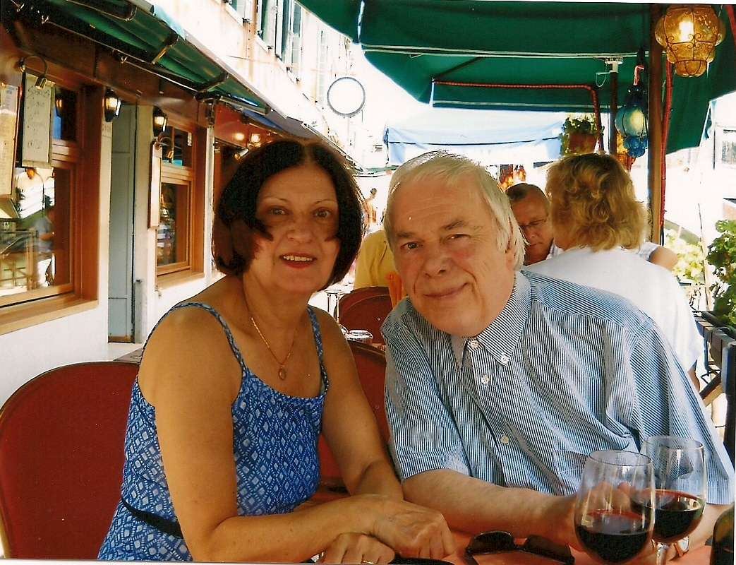 Marc Alyn et son épouse à une terrasse de restaurant à Venise en septembre 2009.